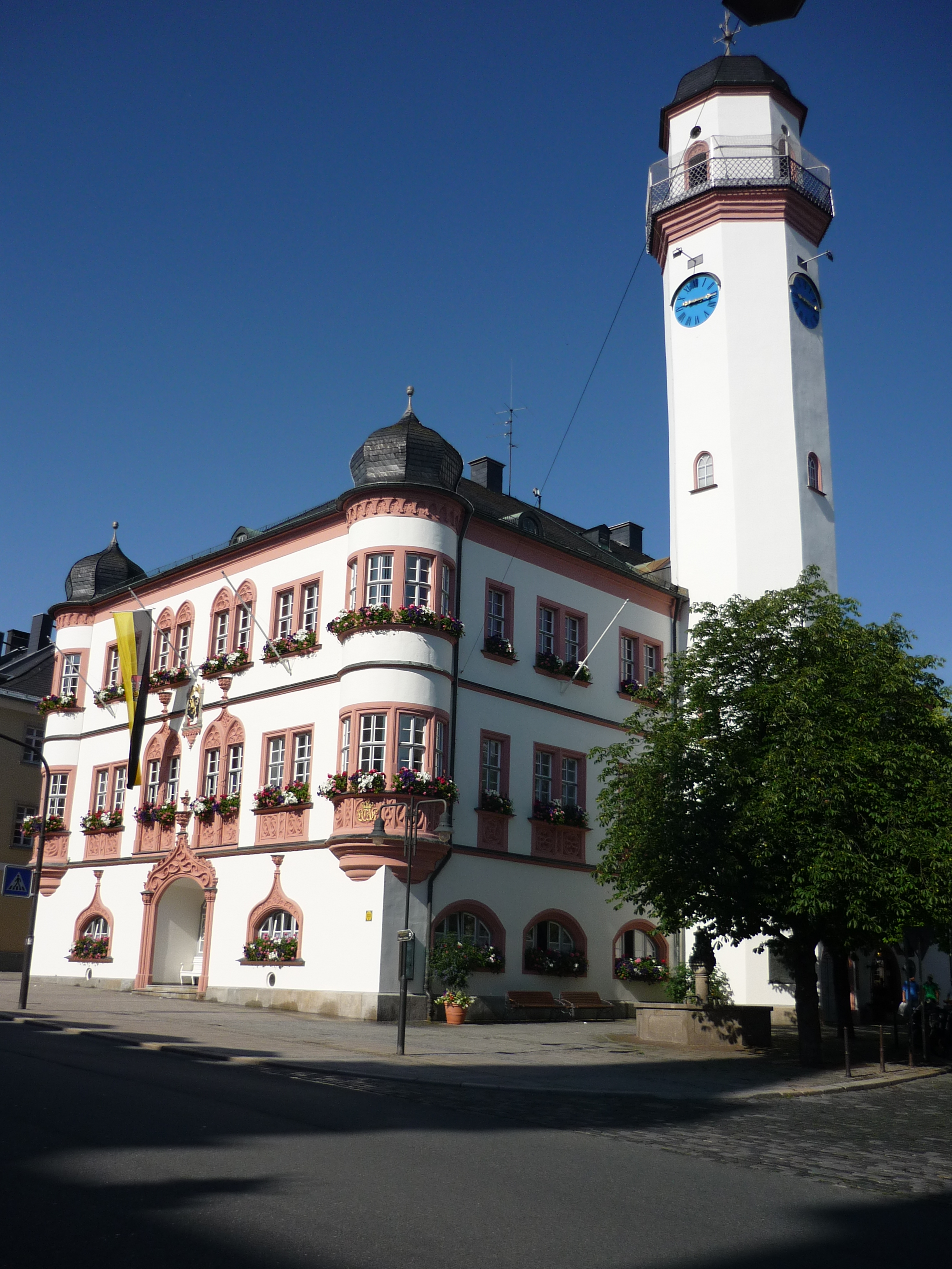 Rathaus der Stadt Hof in der Ludwigstraße